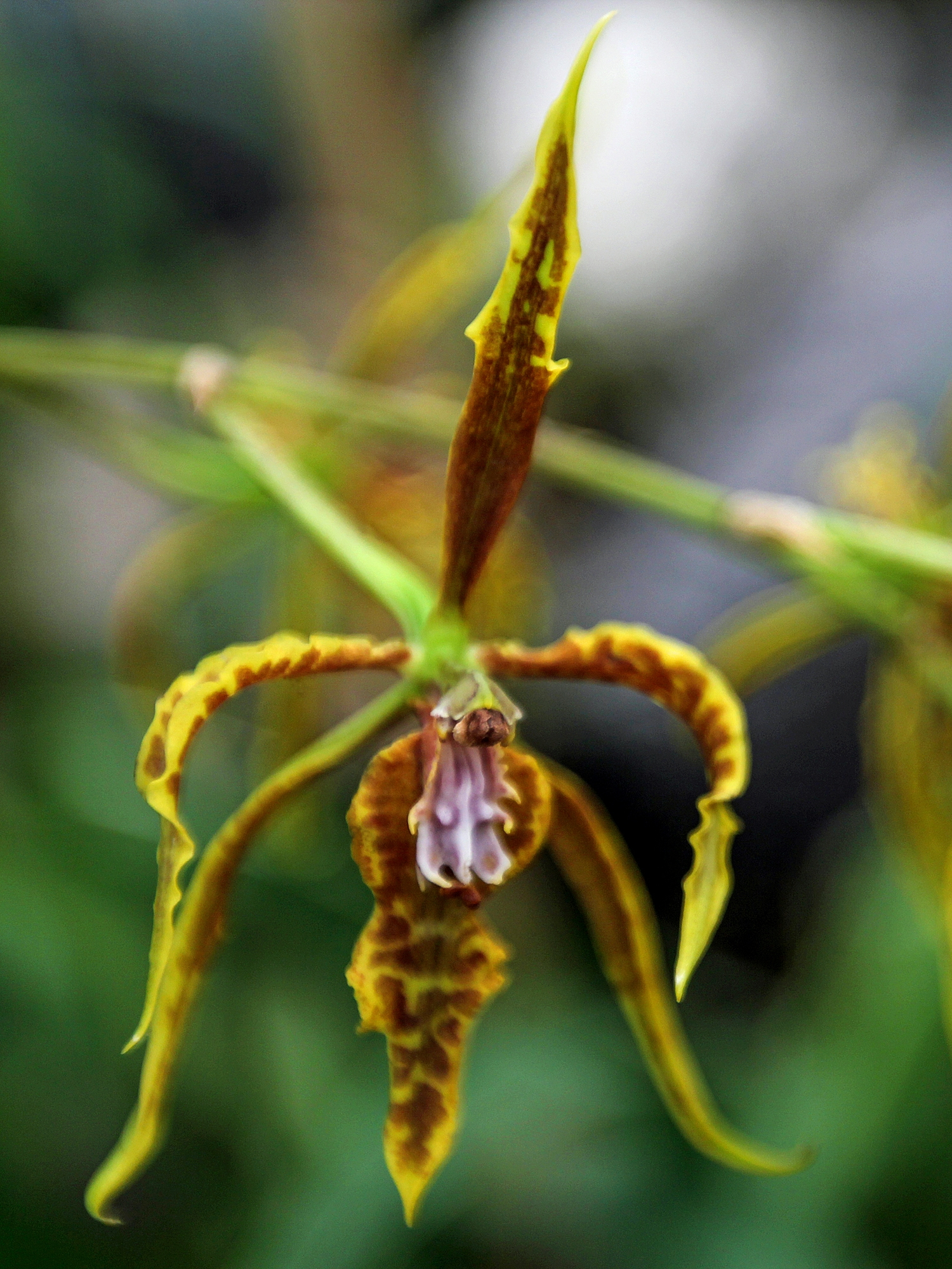 AR PN ANDES QUITO JARDÍN BOTÁNICO ORQUÍDEAS 005